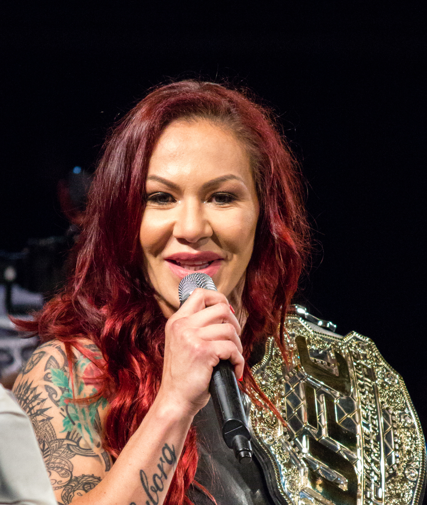 Cristiane "Cyborg" no evento Nação Cyborg I (2018)